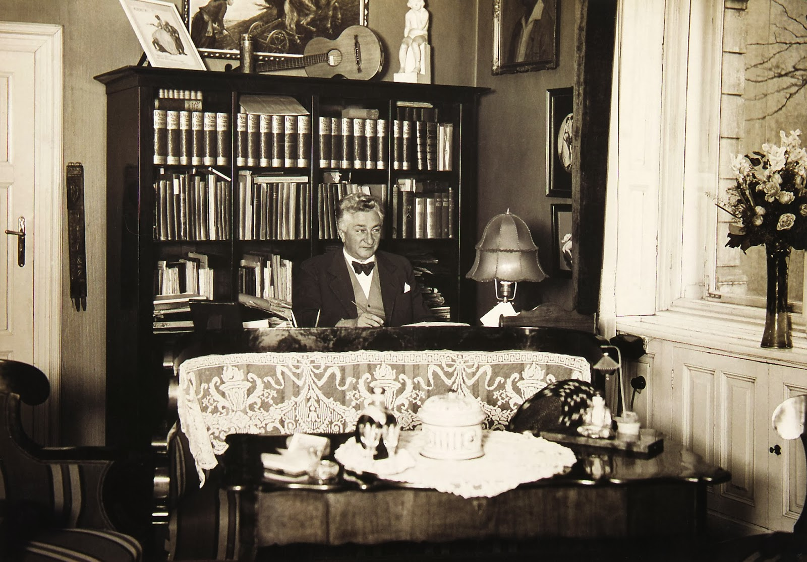 Székelyhidy Ferenc magyar opera-énekes otthonában.